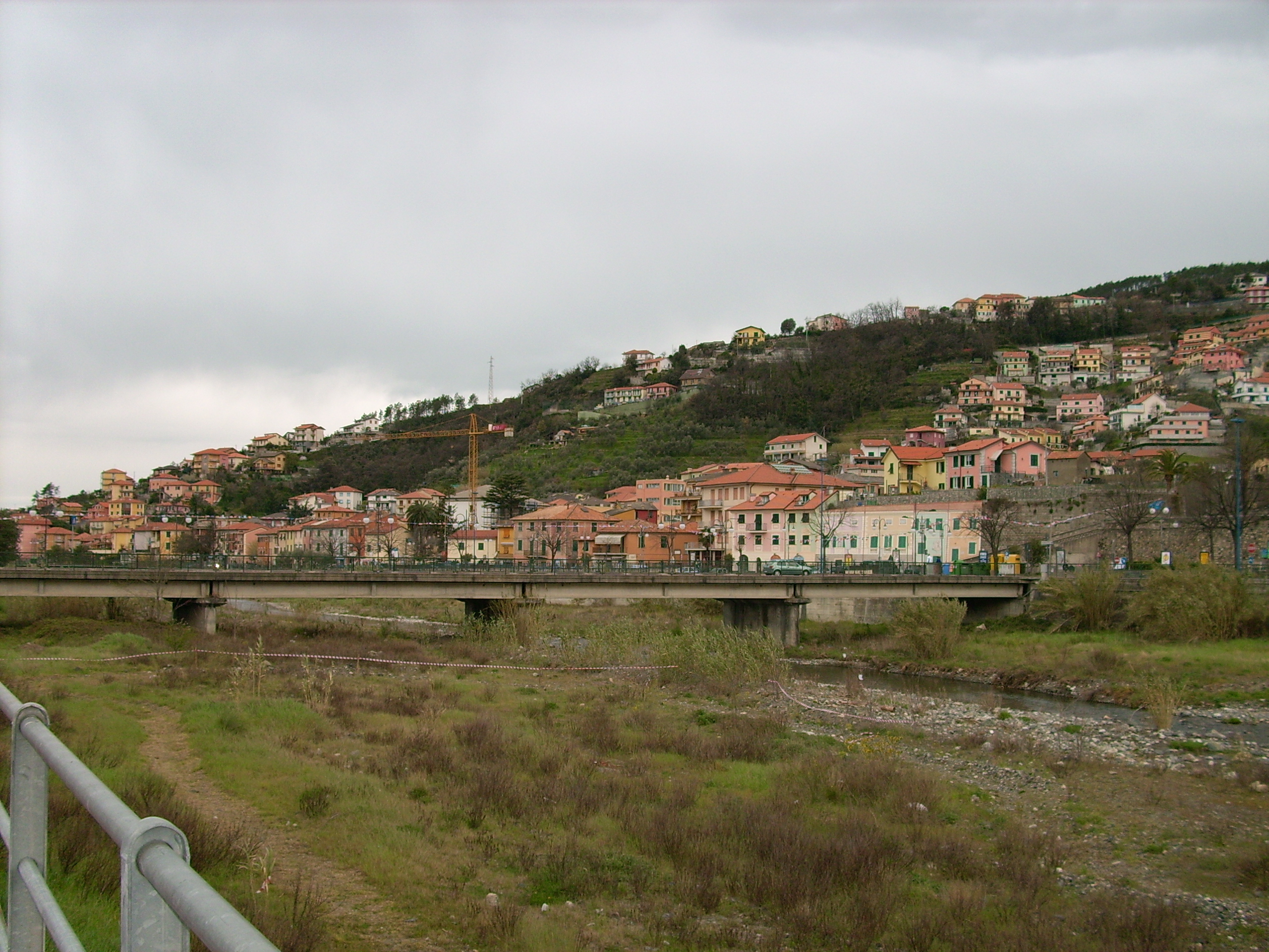 Vista di Casarza Ligure, Liguria, Italia